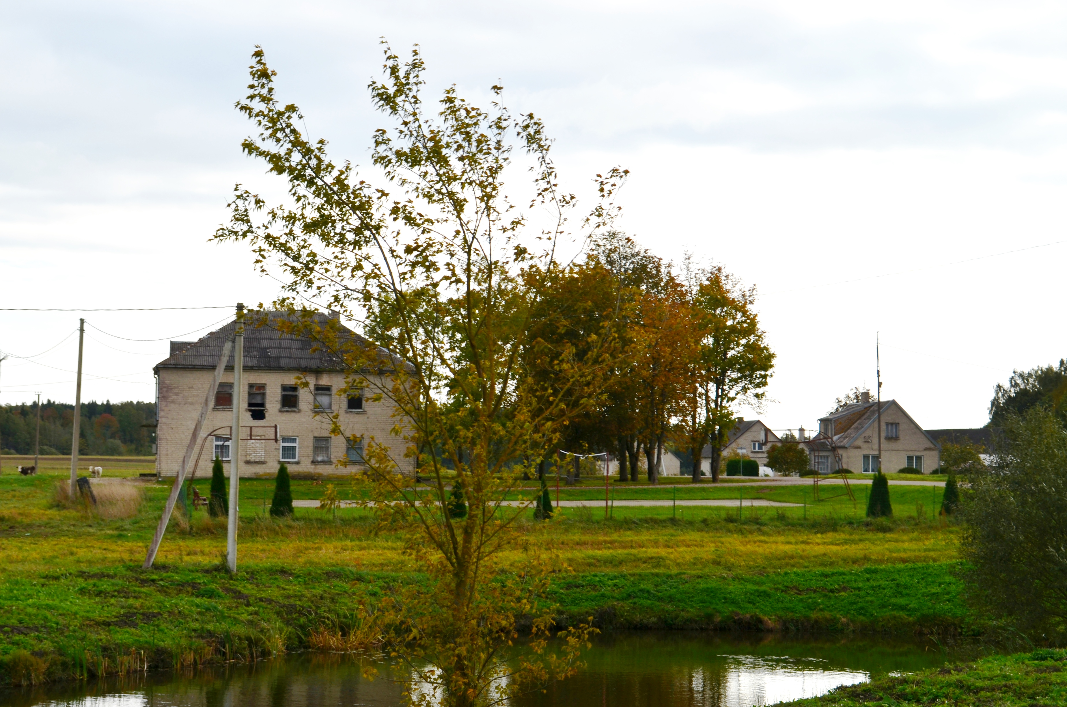 Vašilėnai, Kelmės raj.